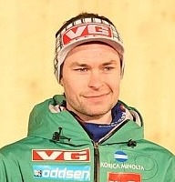 Dekoracja medalowa konkursu indywidualnego mężczyzn na skoczni K-120